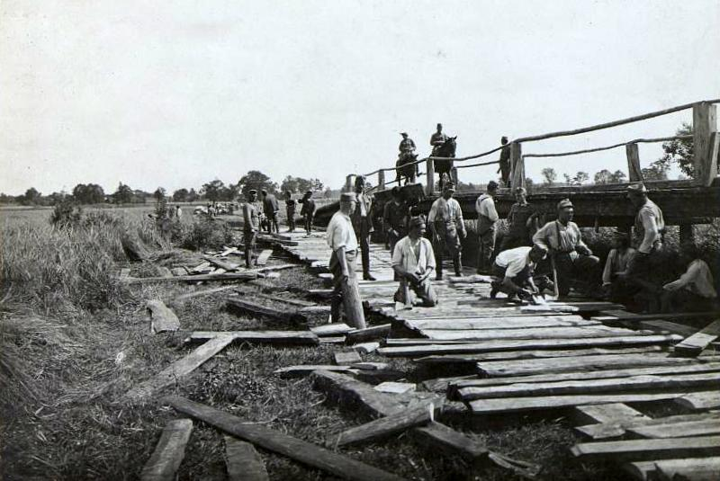 Die Styr Brücke wird durch Legen einer Ausweiche vergrössert